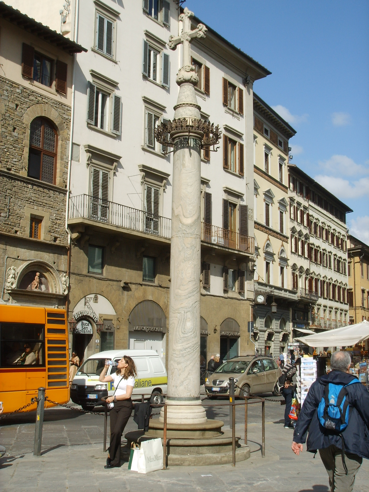 Colonna di san zanobi2